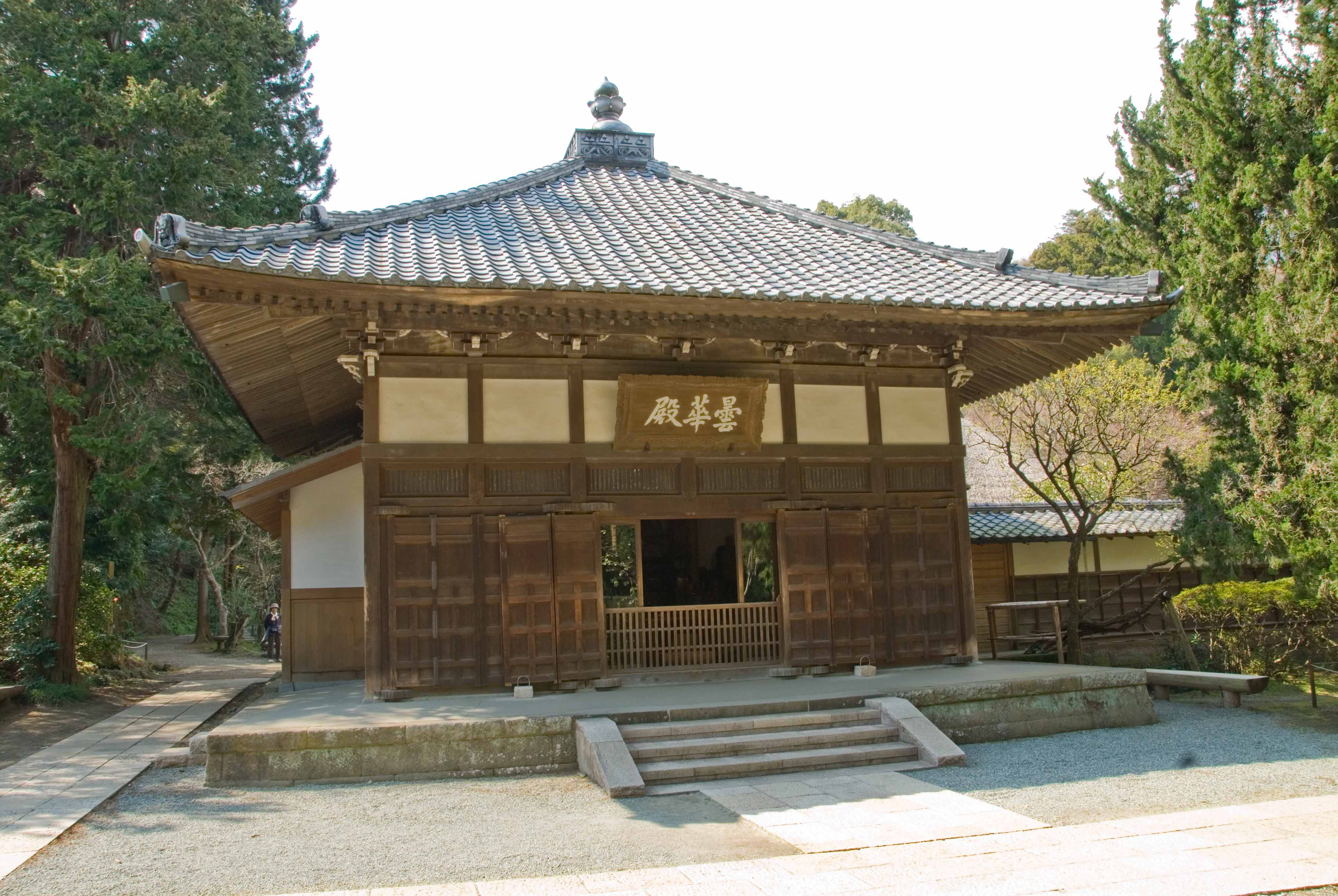 Jochi-ji, Kita-kamakura, Japan